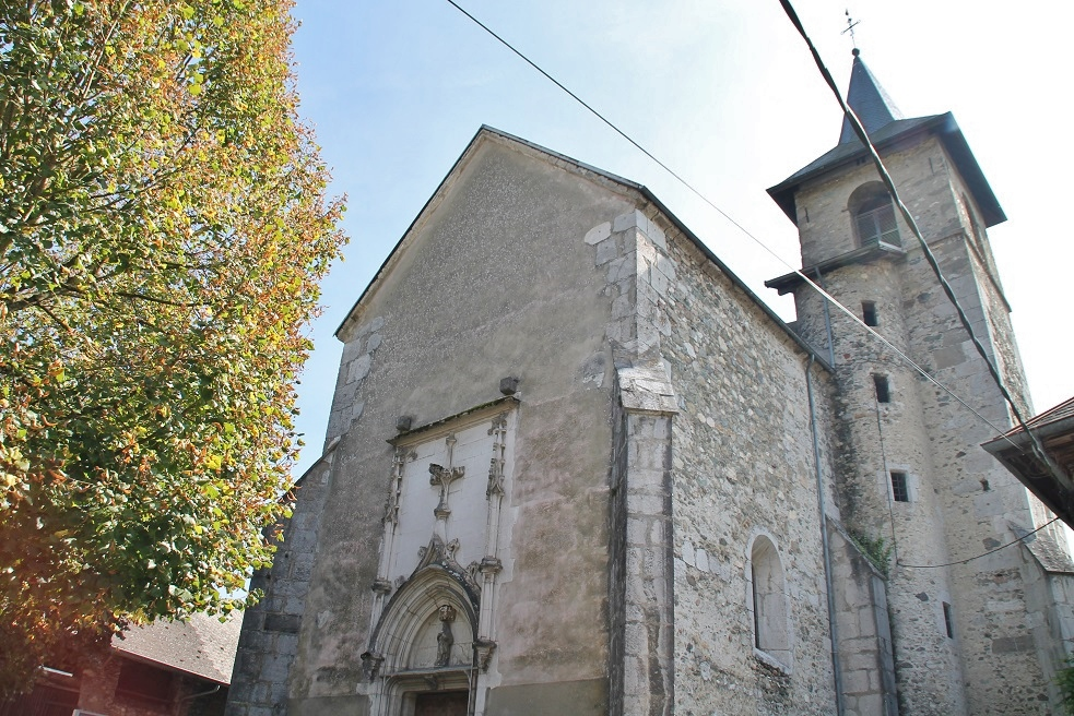 Église Saint-Jean-Baptiste de Saint-Jean-Pied-Gauthier, commune de Coise-Saint-Jean-Pied-Gauthier (73).